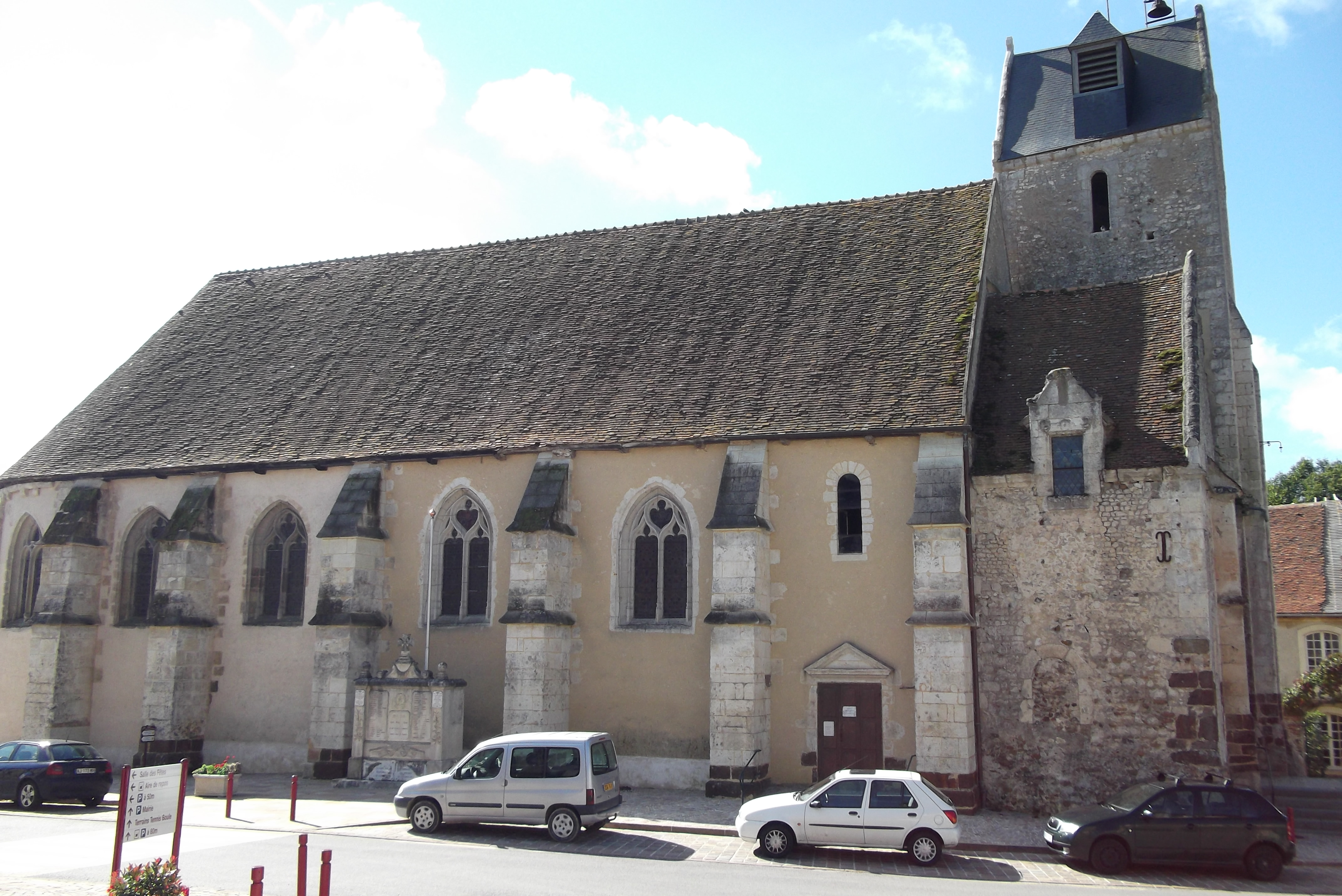 Eglise communale Saint-Medard de Saint-Mard-de-Réno